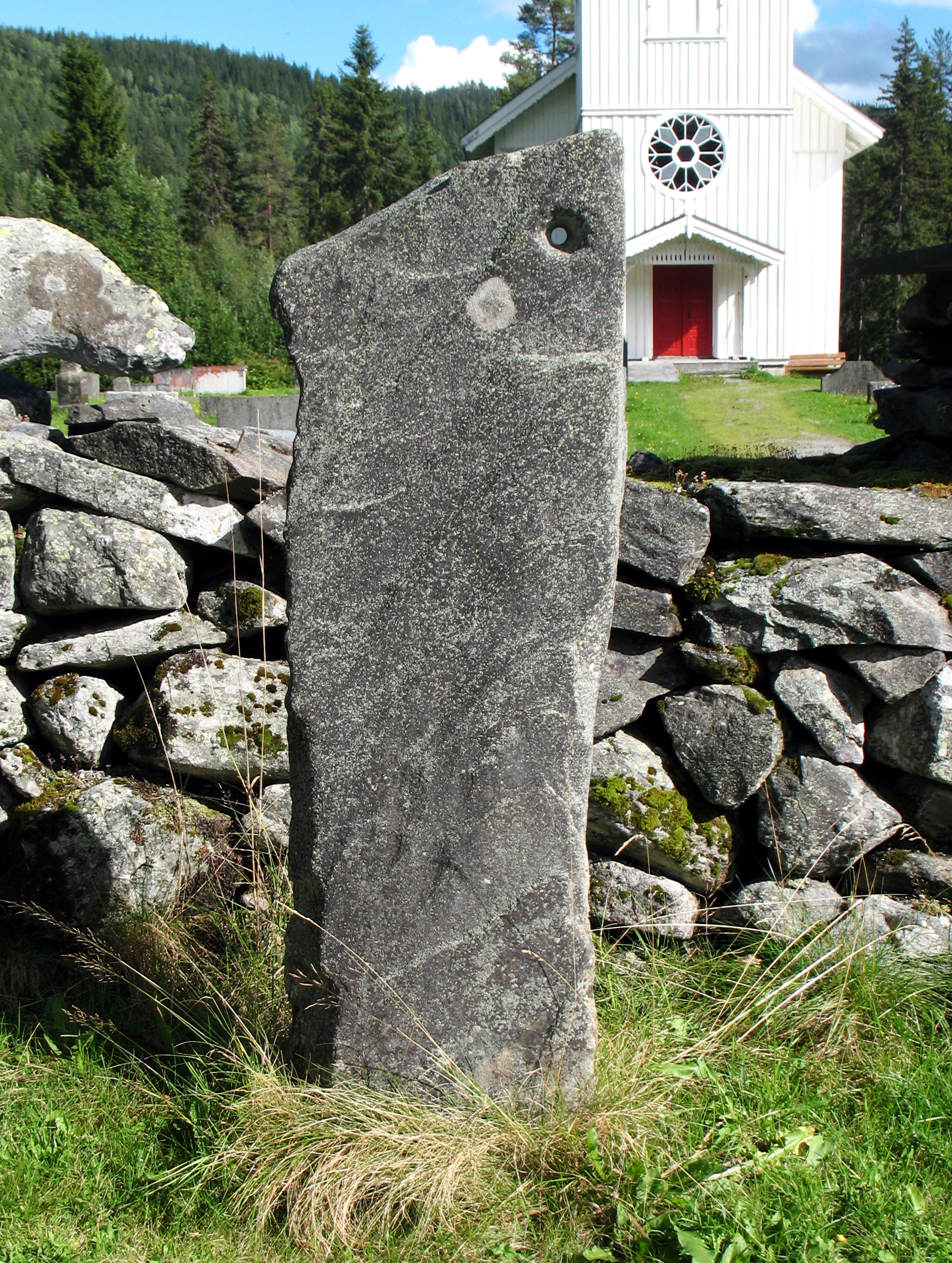 Gapestokken ved Skafså kyrkje i Tokke kommune, Telemark.